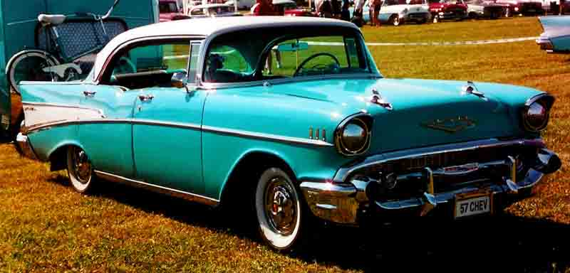 1957 Chevrolet Bel Air Series 2400C, Model 2413 4-Door Hardtop